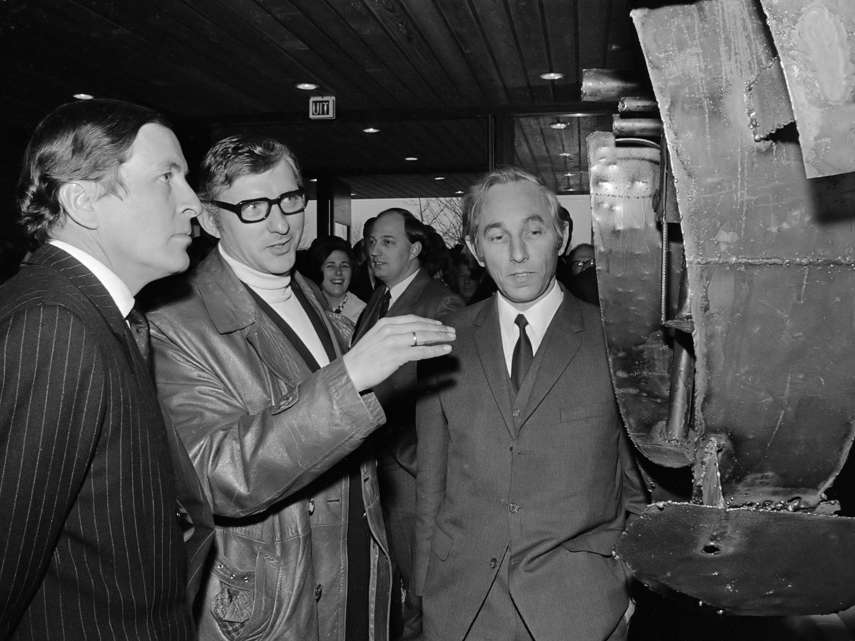 Prins Claus opent CNV-gebouw, Utrecht; v.l.n.r. Prins Claus , Rien Goene (ontwerper van sculptuur), Lanser 14 januari 1971